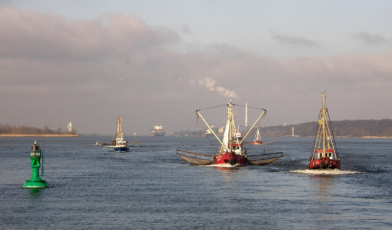 Bilder aus Hamburg